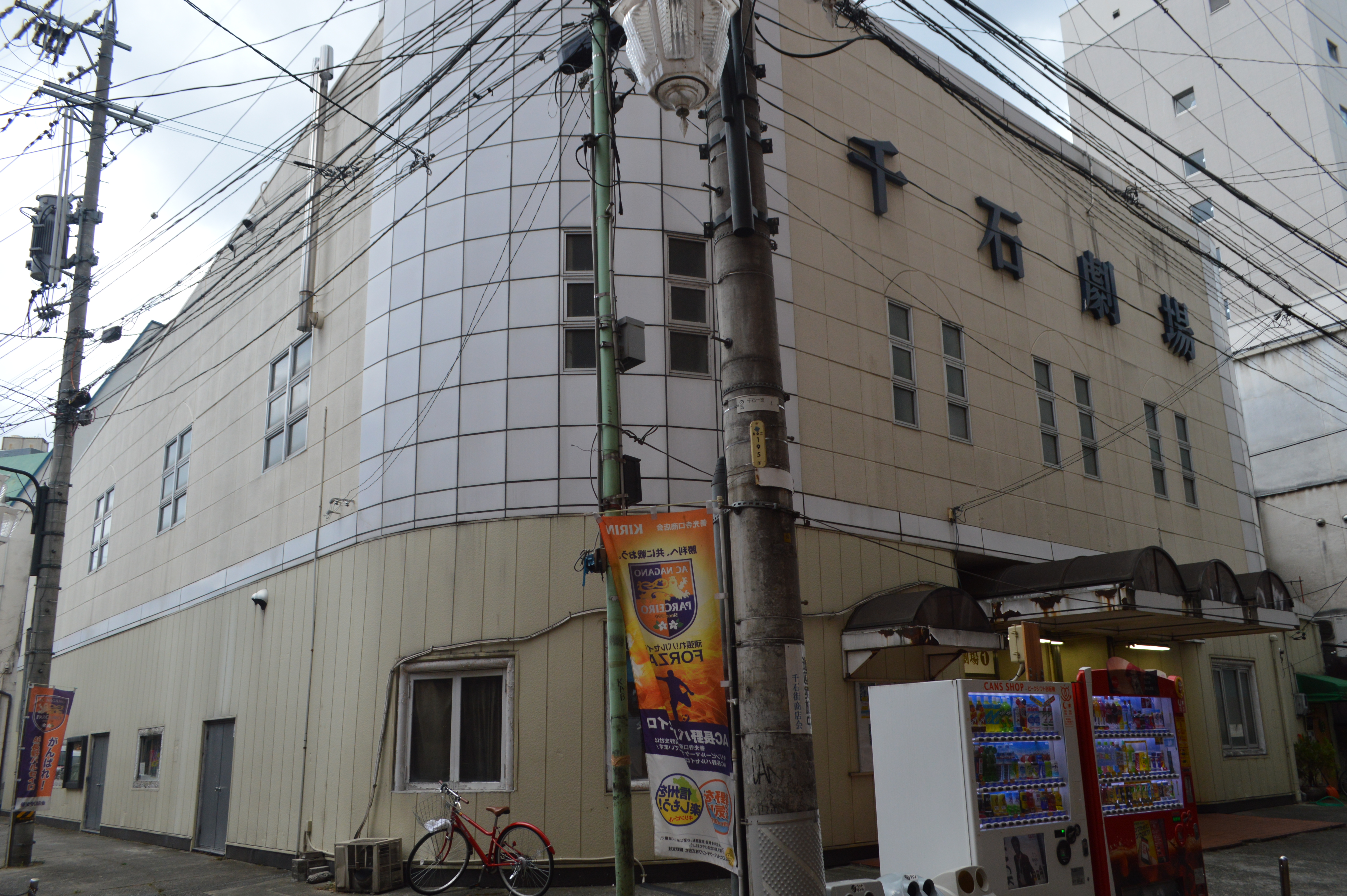 長野市の映画館、長野千石劇場